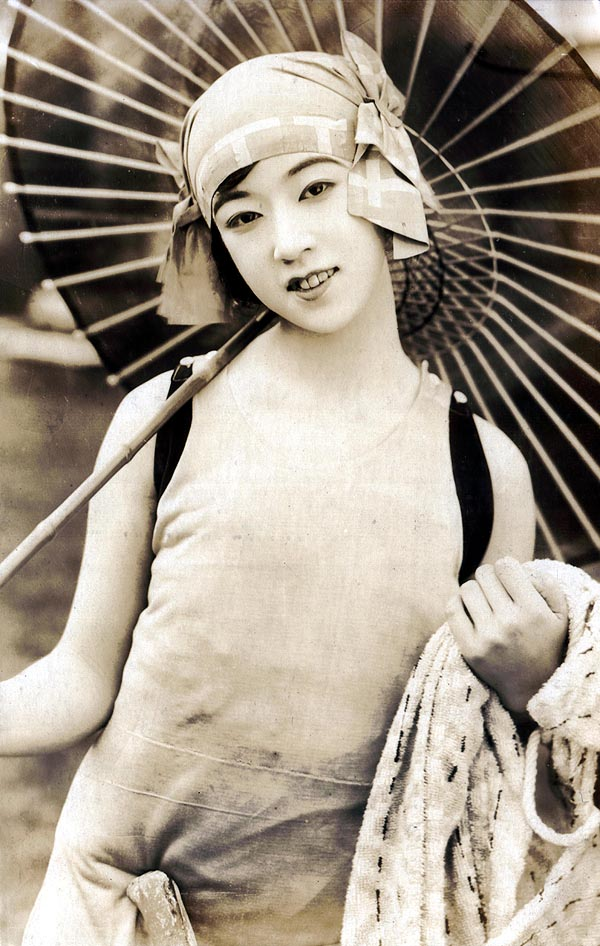 Yukiko Tsukuba (筑波雪子)